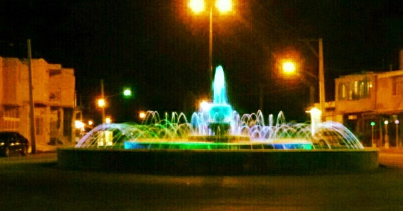 این فلکه در دوراهی گوجان دهچشمه قرار دارد